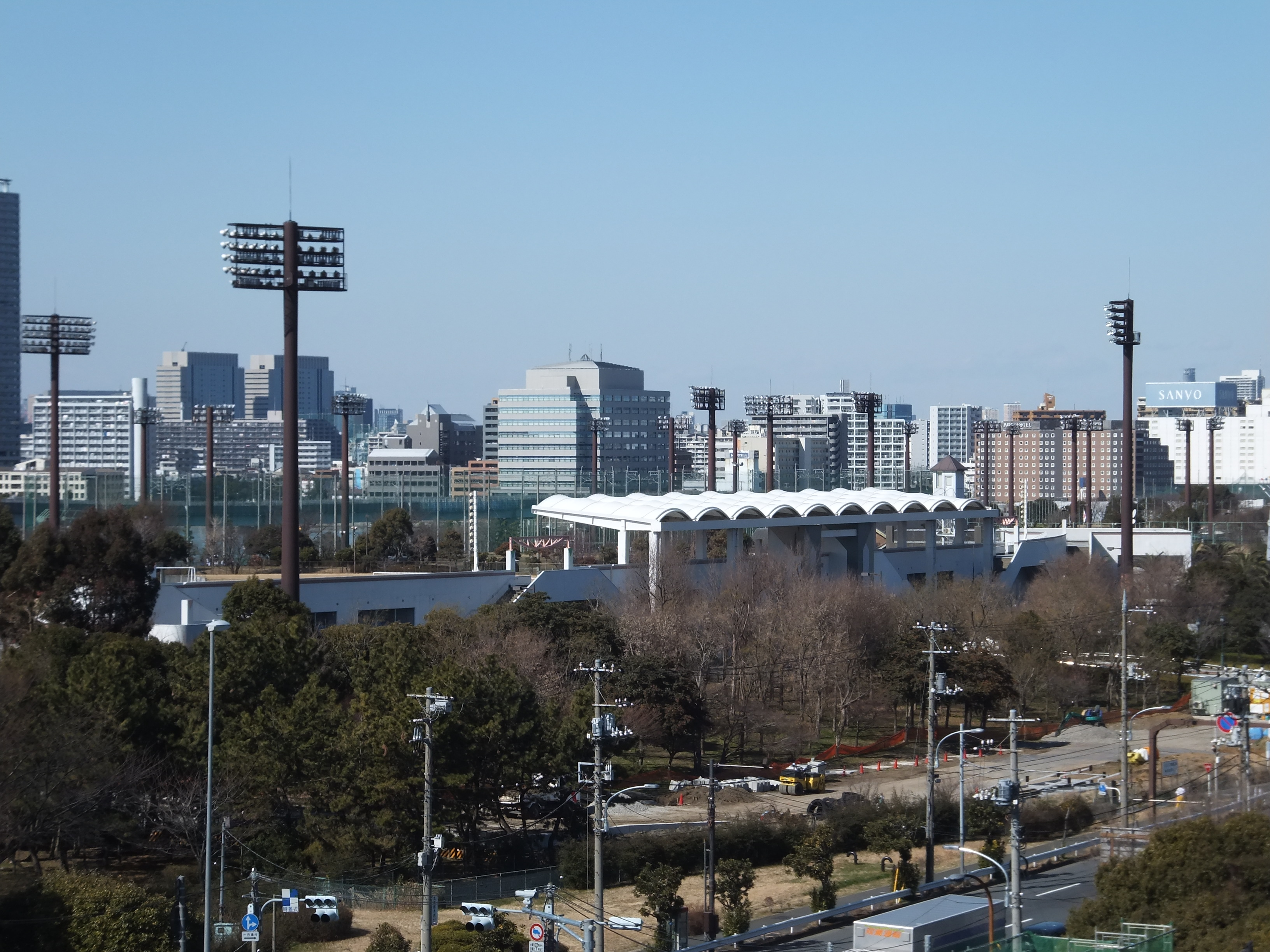 新木場駅から見た夢の島陸上競技場